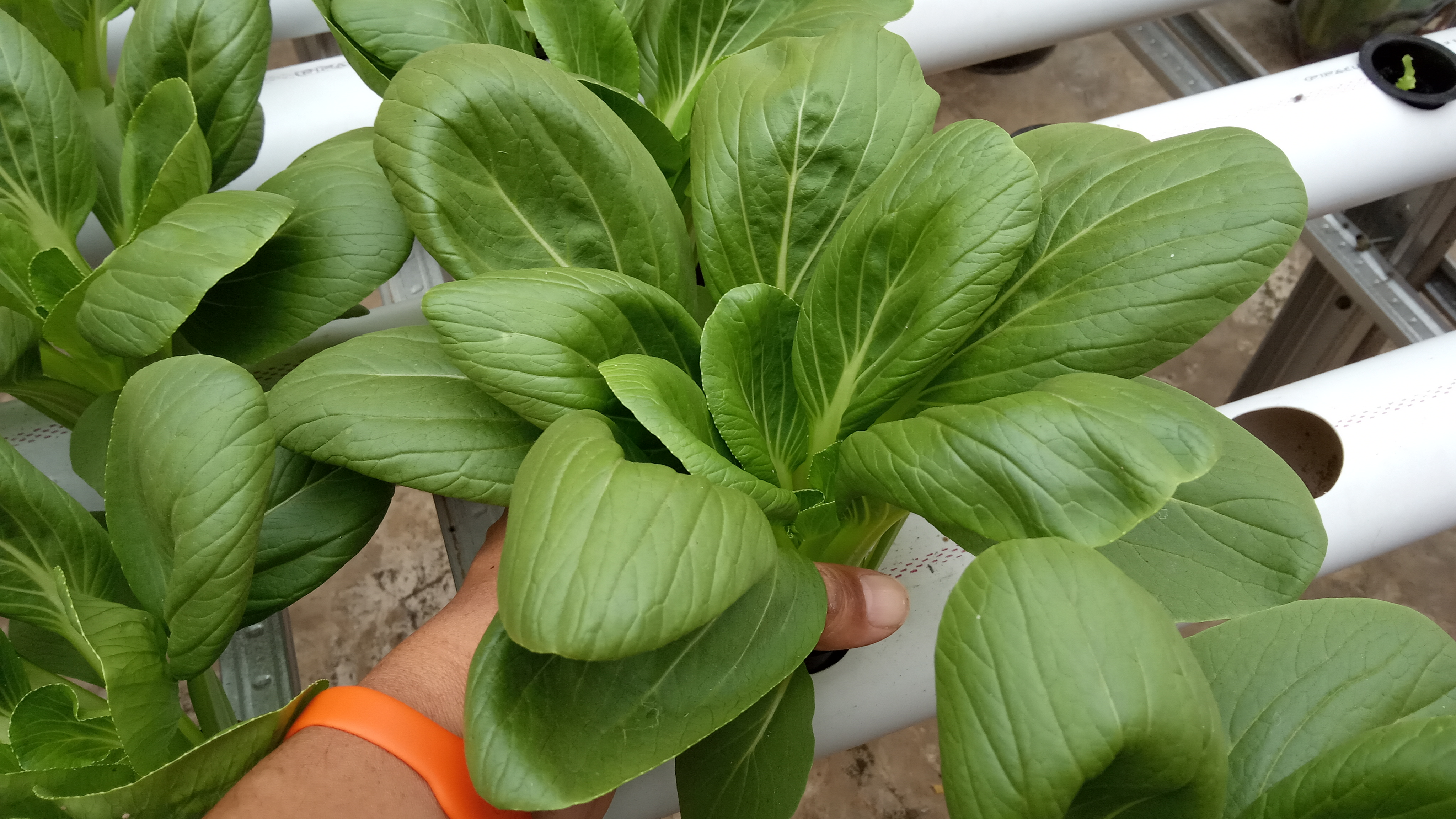 Foto hasil panen Pakcoy ini berumur 25 HST (Hari Setelah Tanam) atau 35 hari HSS (Hari Setelah Semai) menggunakan sistem Hidroponik DFT (Deep Flow Technique) di kebun kami di SAP Garden Hidroponik, Purwokerto.